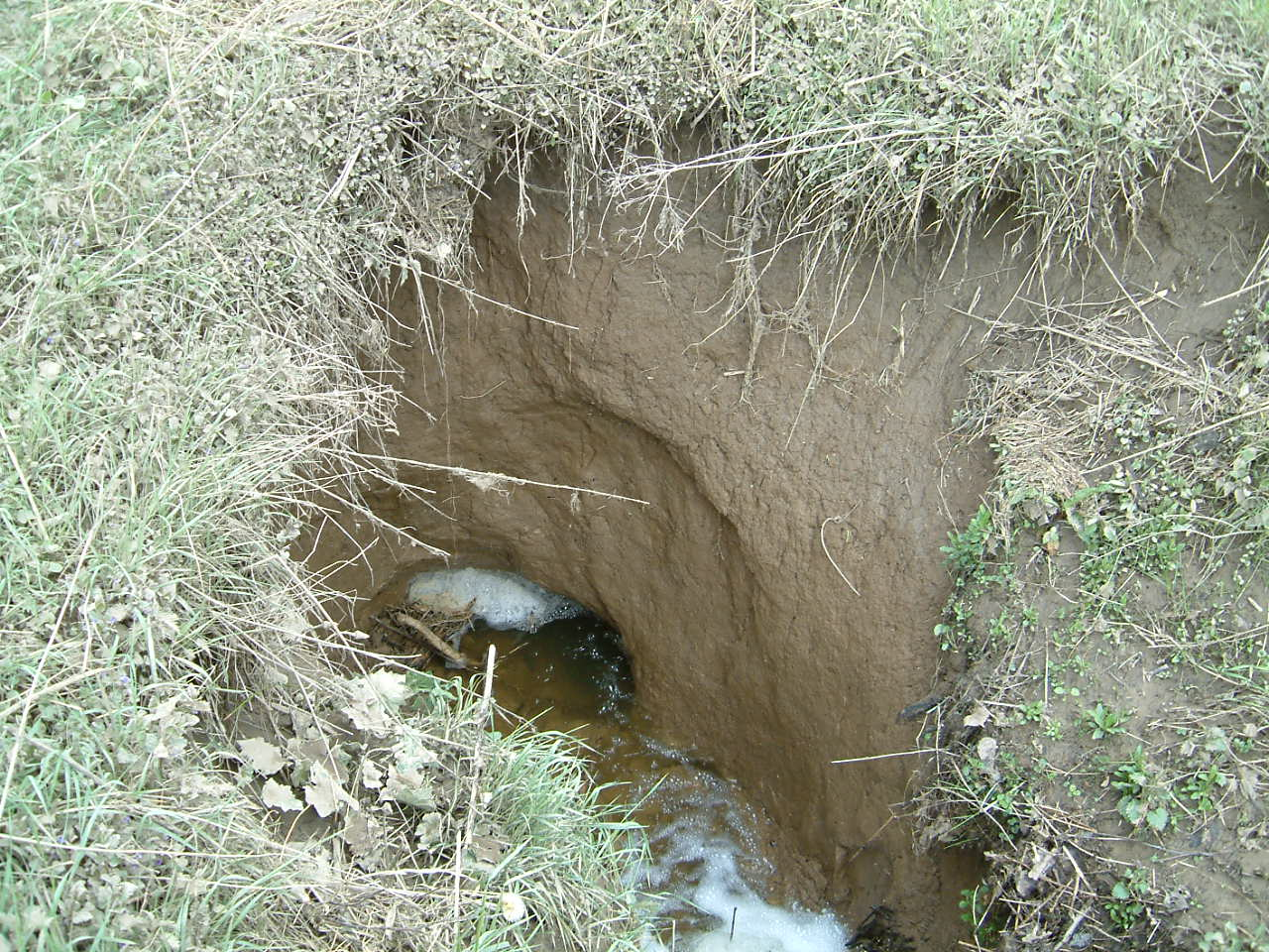 Schluckloch (Ponor), in der Gemarkung „Entenhöhlen“ bei Essentho (Stadt Marsberg, Hochsauerlandkreis); verkarstete Zechsteinkalke